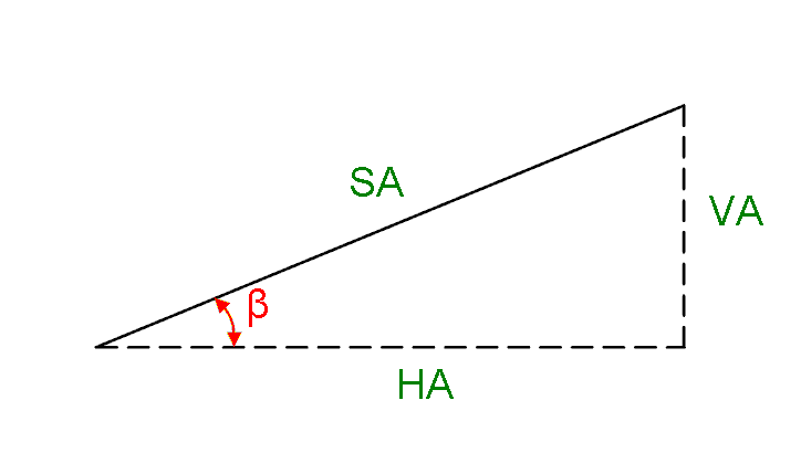 Trigonometrische hoogtemeting vereenvoudigd schematisch weergegeven, in haar meest eenvoudige vorm